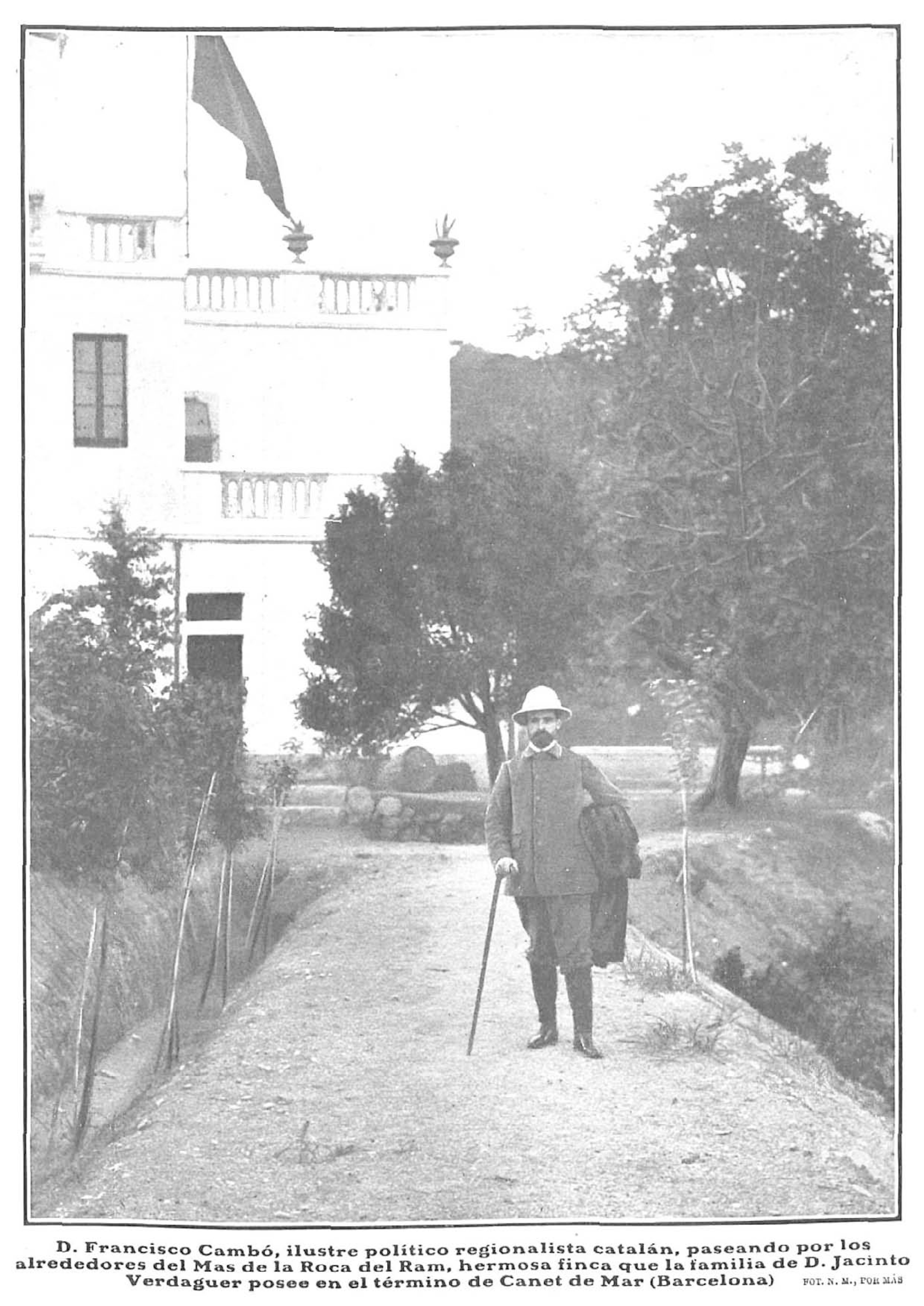 Francisco Cambó paseando por los alrededores de la finca del Mas de la Roca del Ram en Canet de Mar.